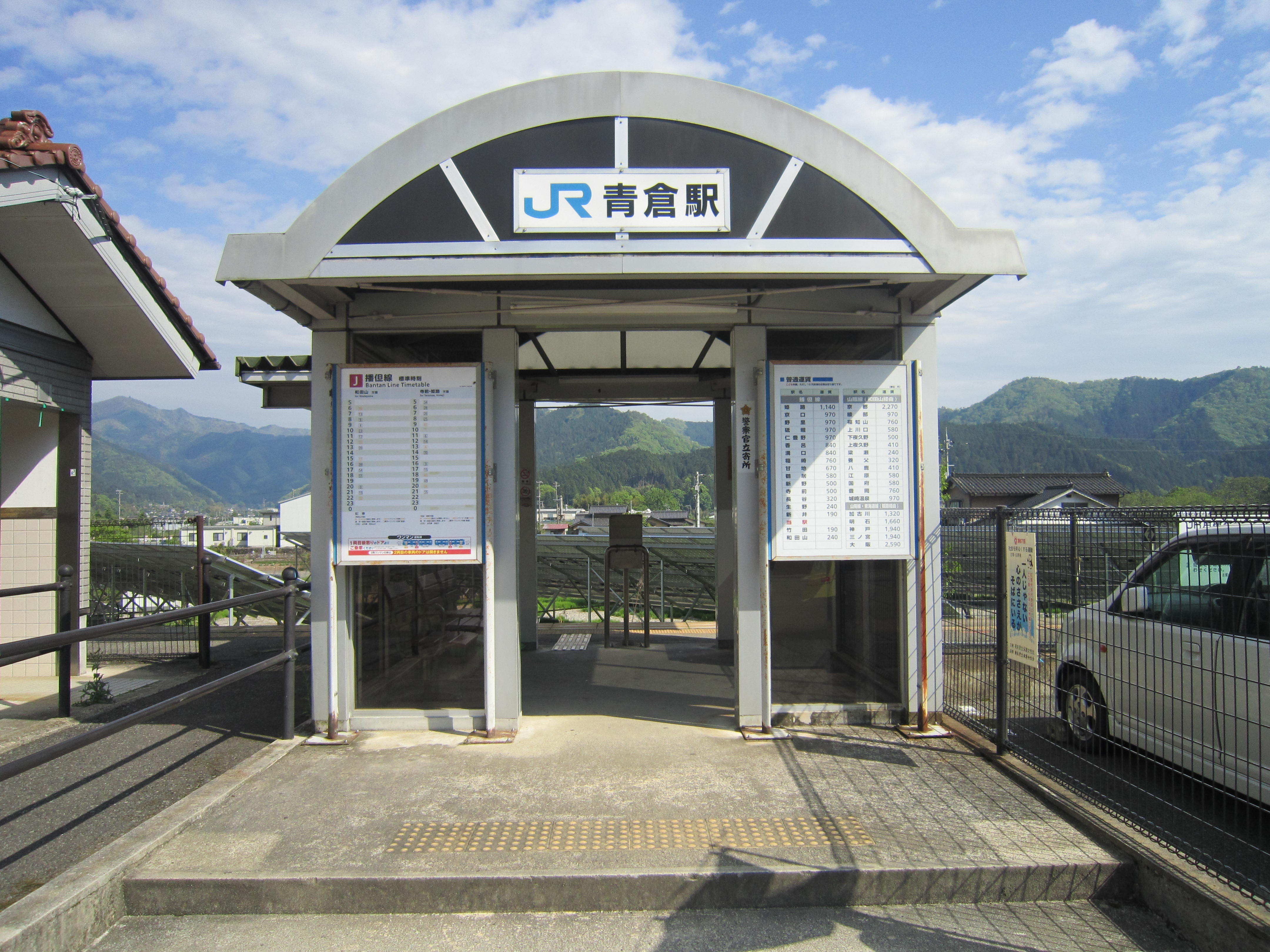 青倉駅出入り口正面。